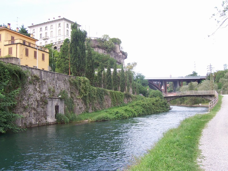 Trezzo sull'Adda - Il Naviglio Martesana a Concesa